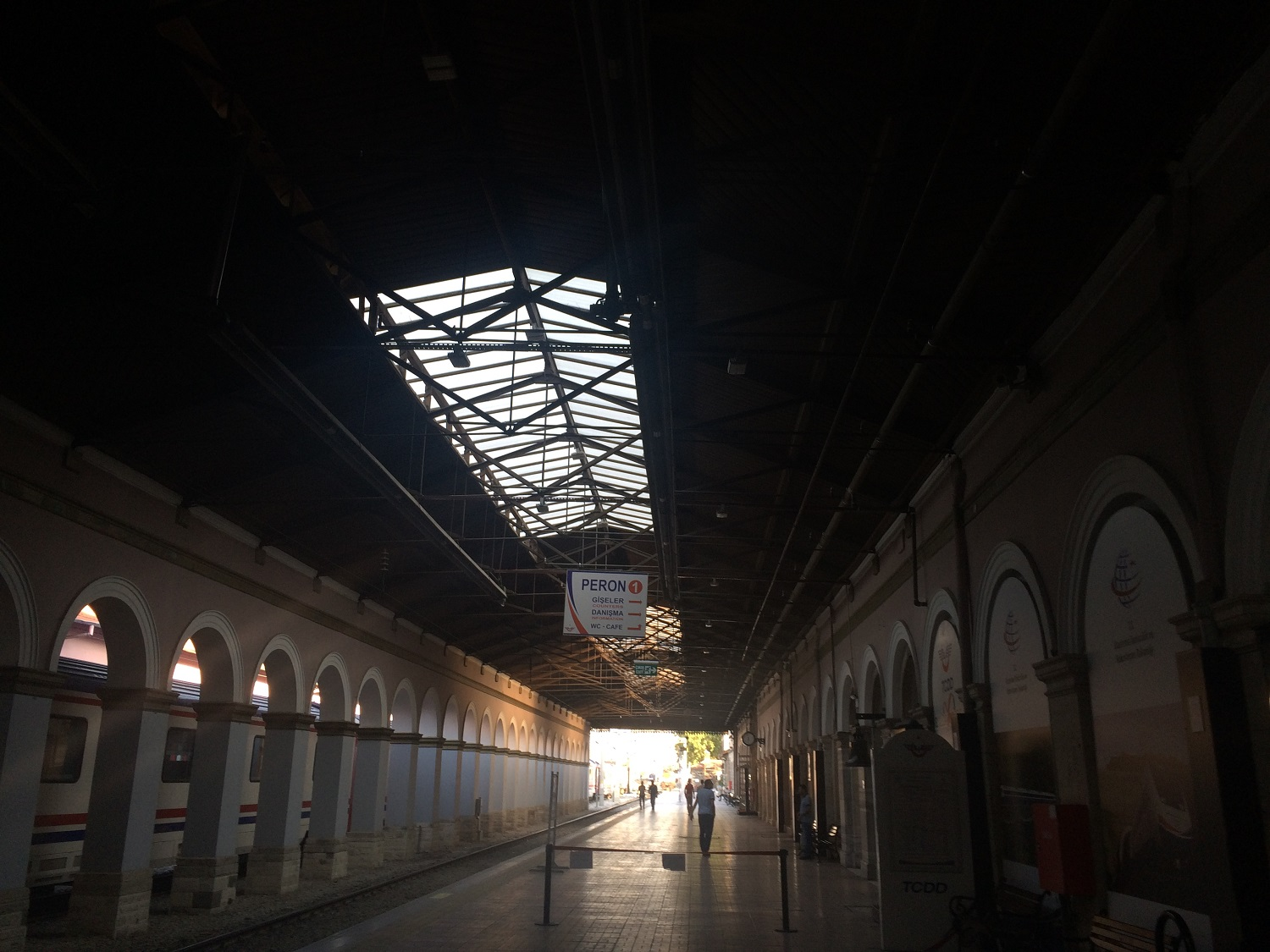 Alsancak Garı İç Mekan